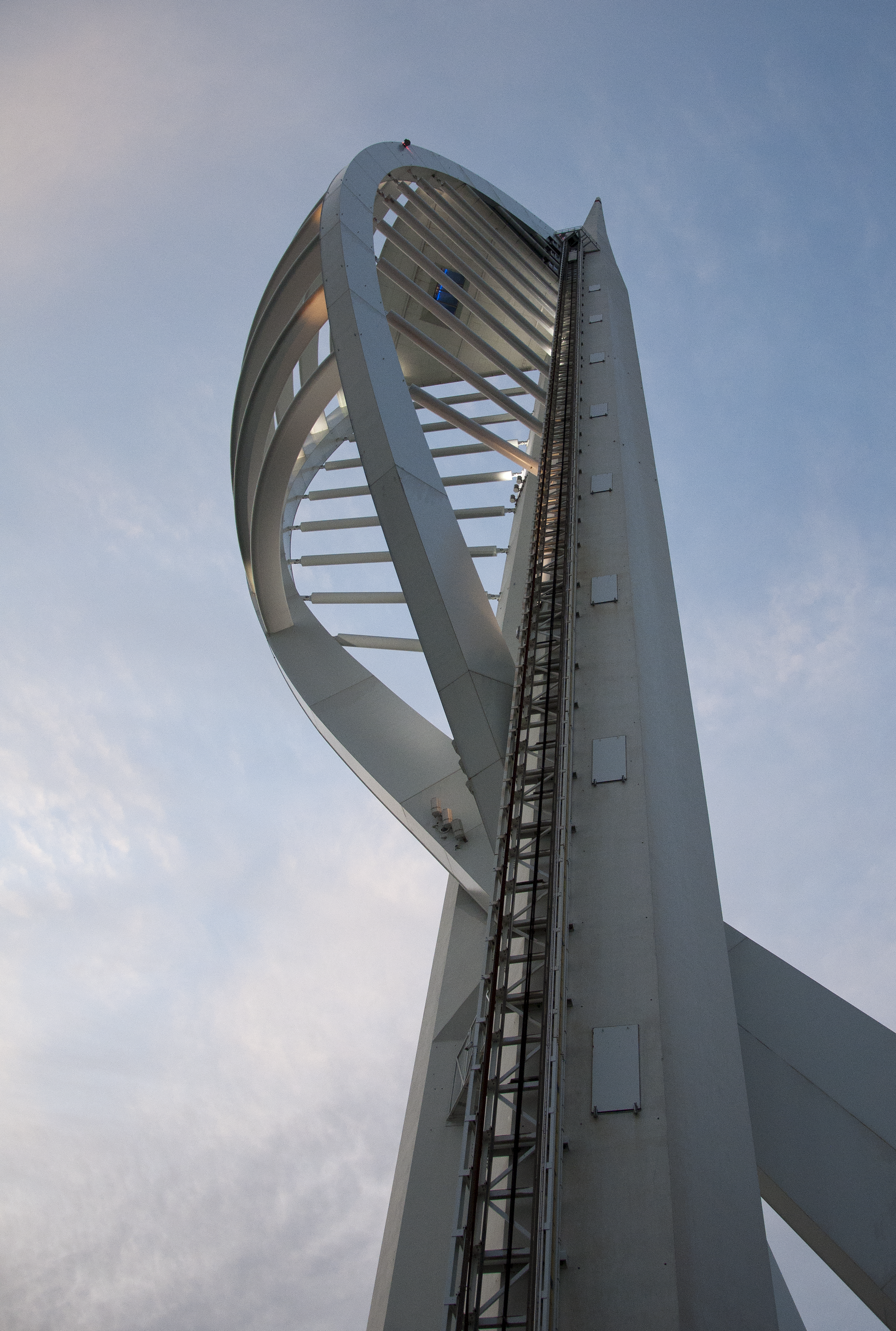 De Spinnaker Tower te Portsmouth, Engeland